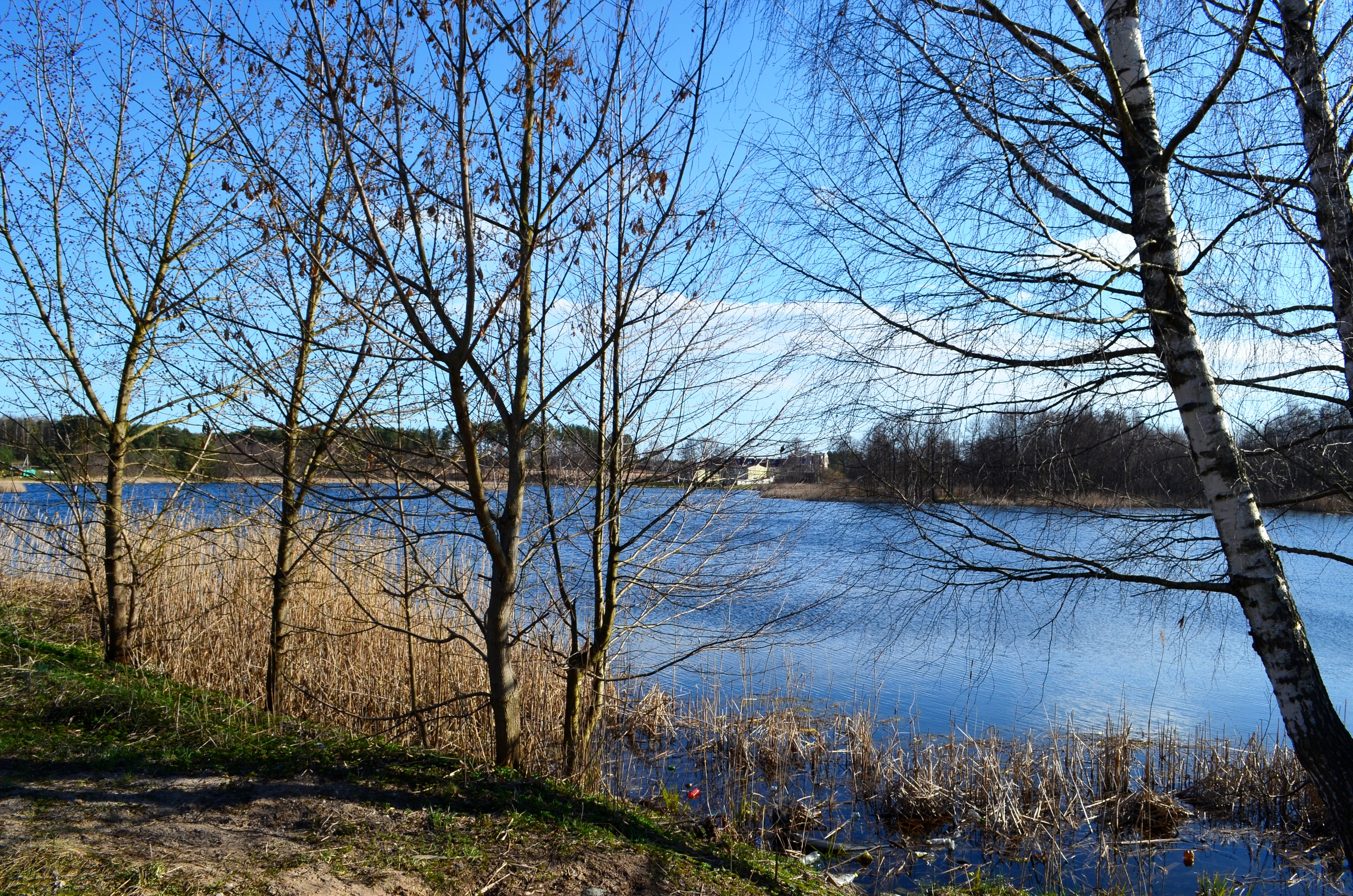 Salotės ežeras, Salotė, Vilnius